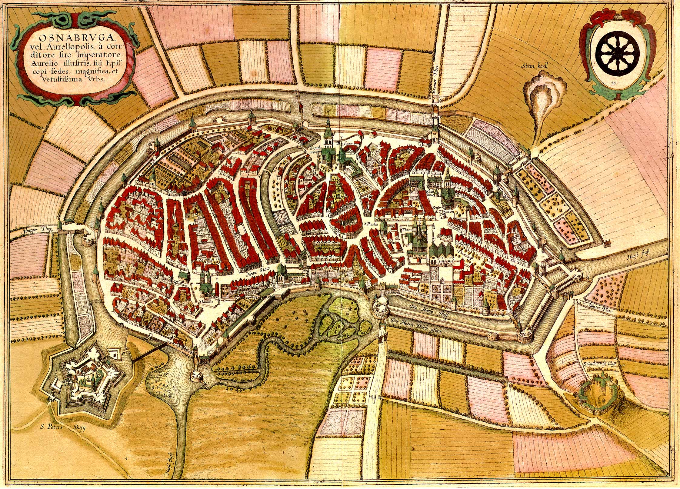 Stadtplan von Osnabrück von Wenzel Hollar aus dem Jahr 1633, Karte nicht genordet